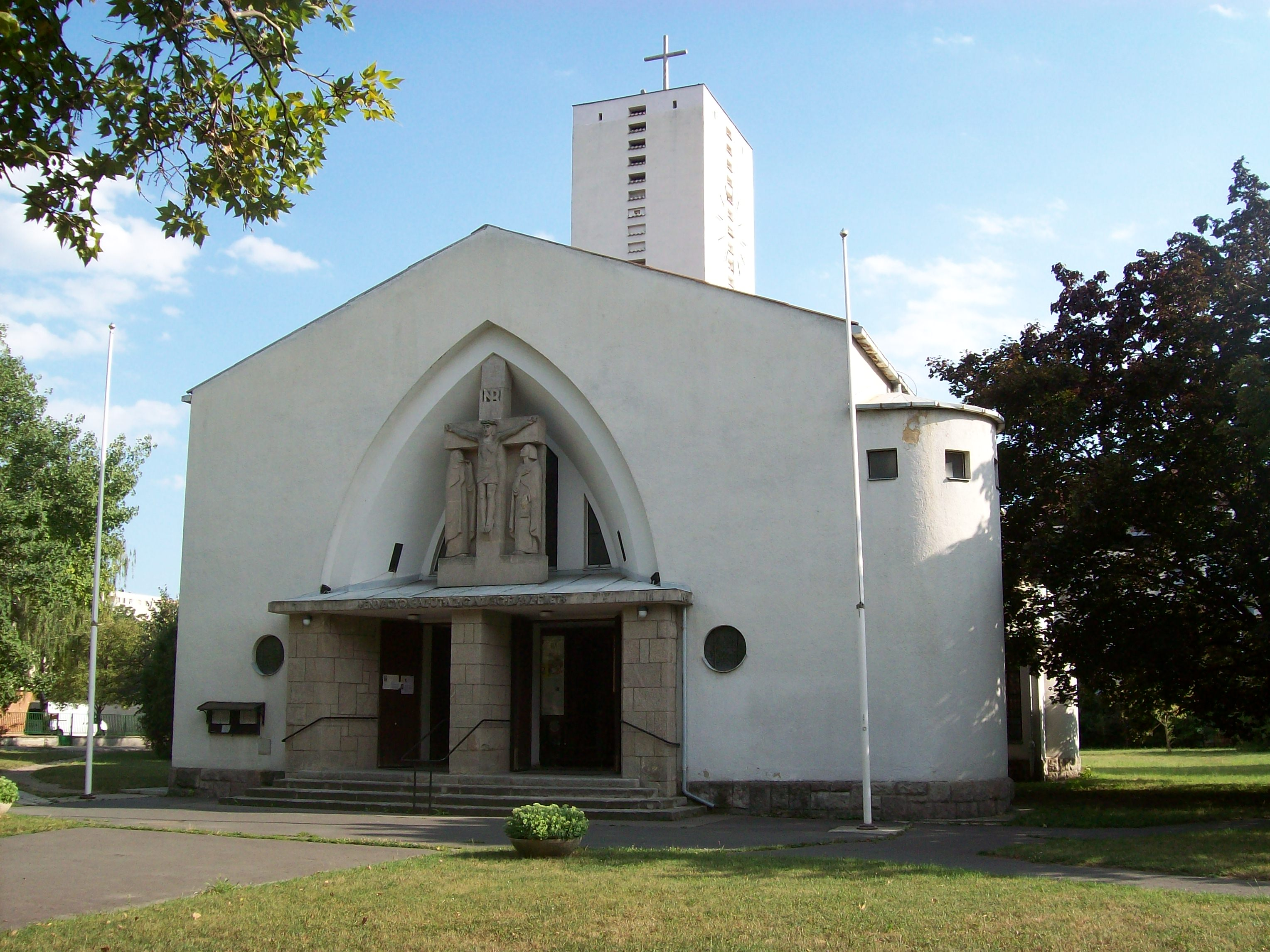 Az albertfalvi Szent Mihály róm. kath. templom. Épült Kismarthy Lechner Jenő és fia, ifj. Lechner Jenő tervei szerint (1941) Object location47° 26′ 53.24″ N, 19° 02′ 07.12″ E